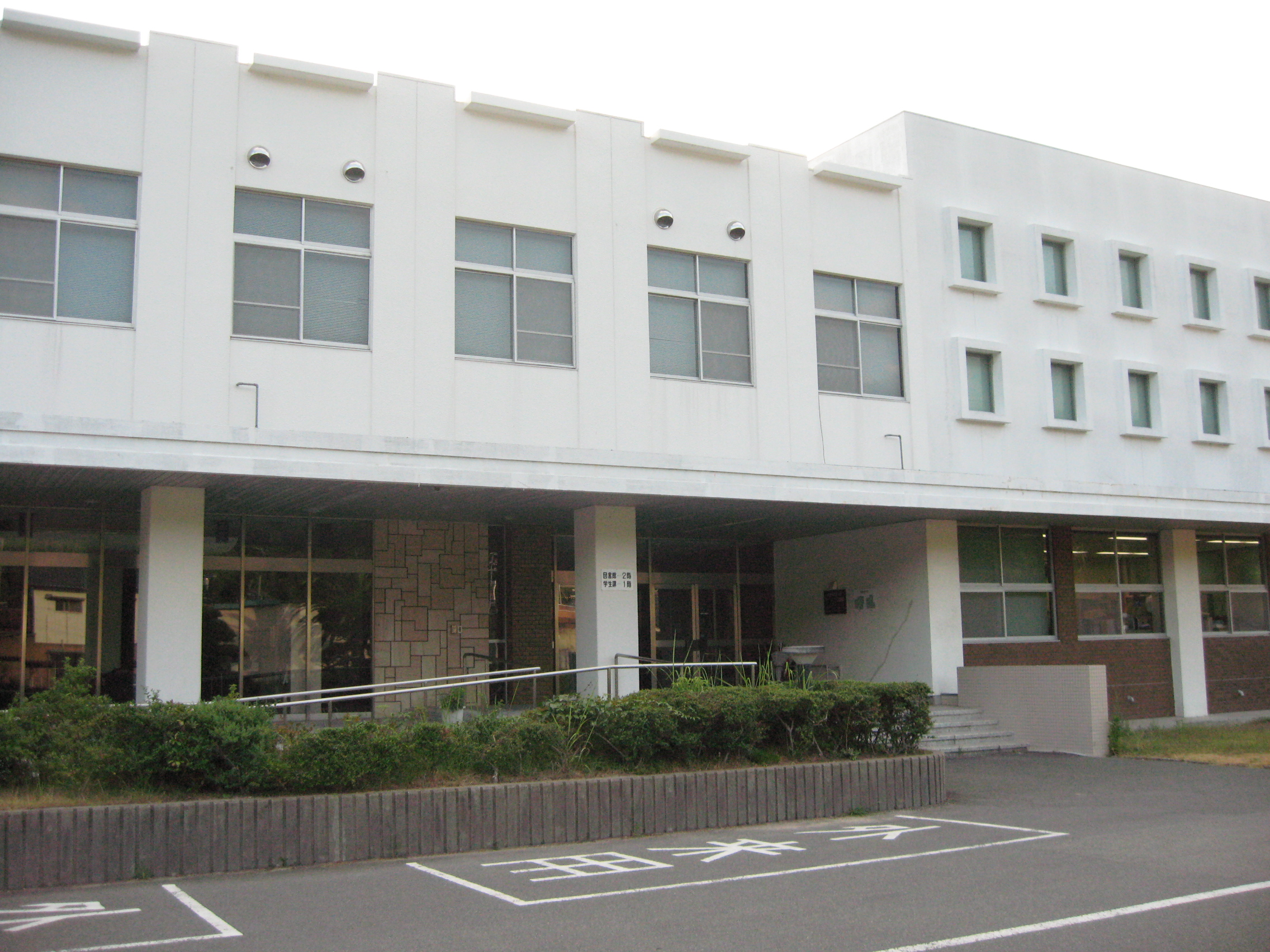 大島商船高等専門学校（学生課棟）